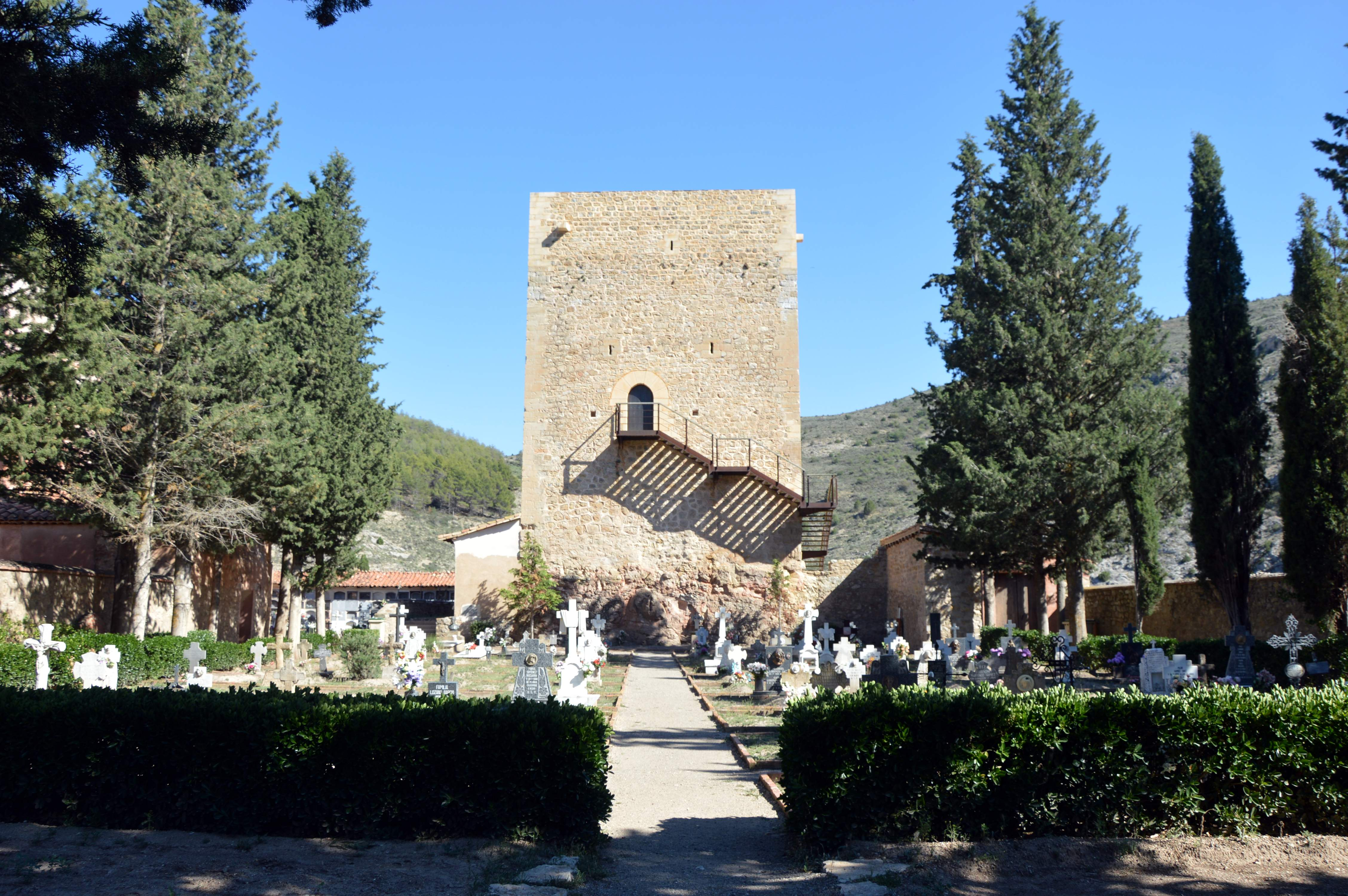 Vista septentrional de la Torre Blanca en Albarracín (Teruel), a los pies el cementerio, solar del antiguo Convento de Dominicos (2017).